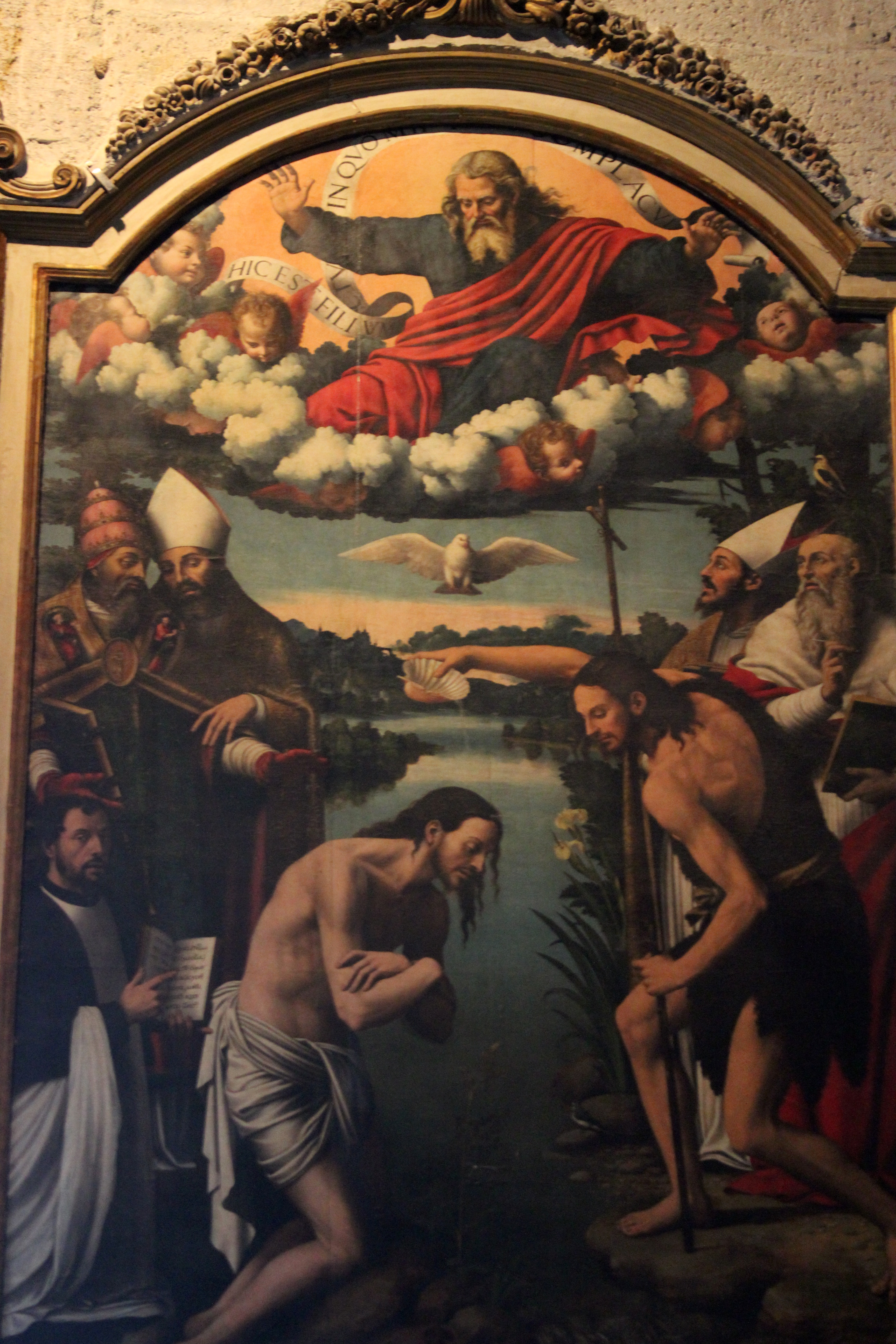 Vicente Masip. Bautismo de Cristo. Catedral de Valencia.